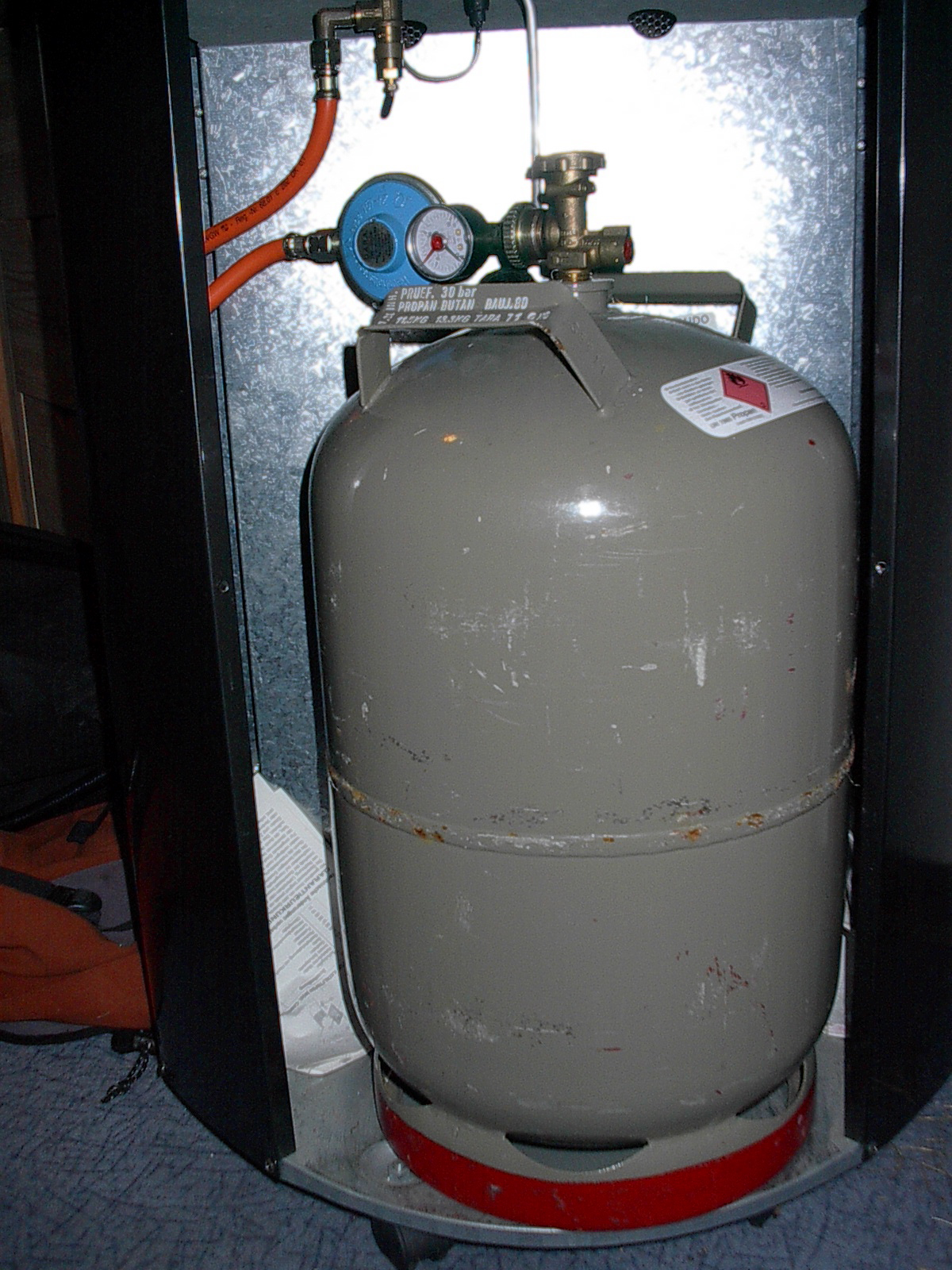 graue Eigentums-Stahlgasflasche mit 11 kg verflüssigtem Propangas, angeschlossen mit Druckminderer an einen Gas-Katalytofen. Das Leergewicht (Tara) der Gasflache ist typischerweise entweder eingeschlagen oder aufgedruckt, üblicherweise zwischen 10 und 11 kg. "Füllung" geschieht üblicherweise durch Austausch der leeren gegen eine volle Flasche.